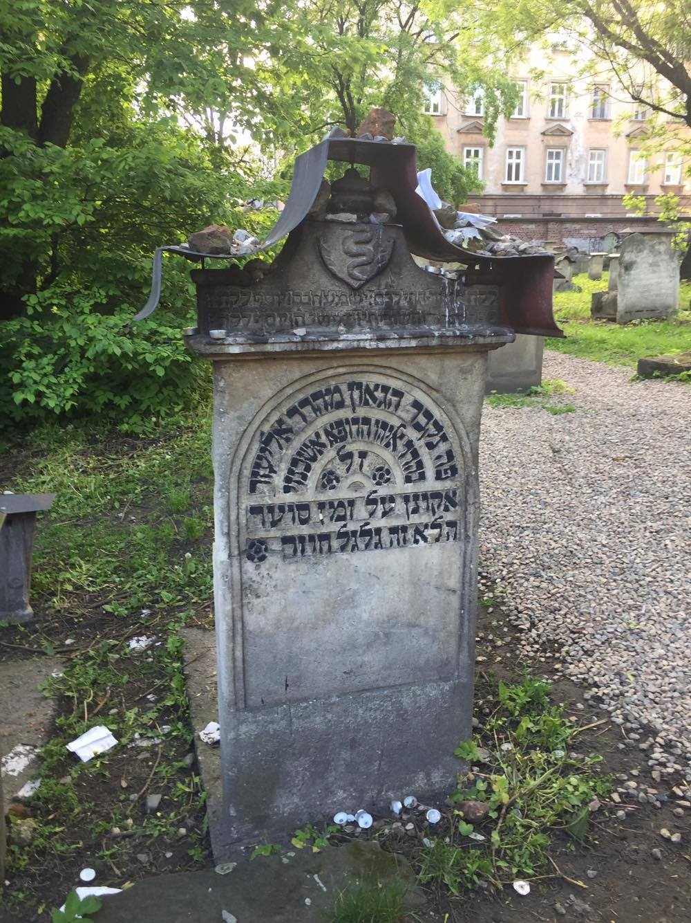 Náhrobek Eliezera Aškenáziho na Starém židovském hřnbitově v Krakově